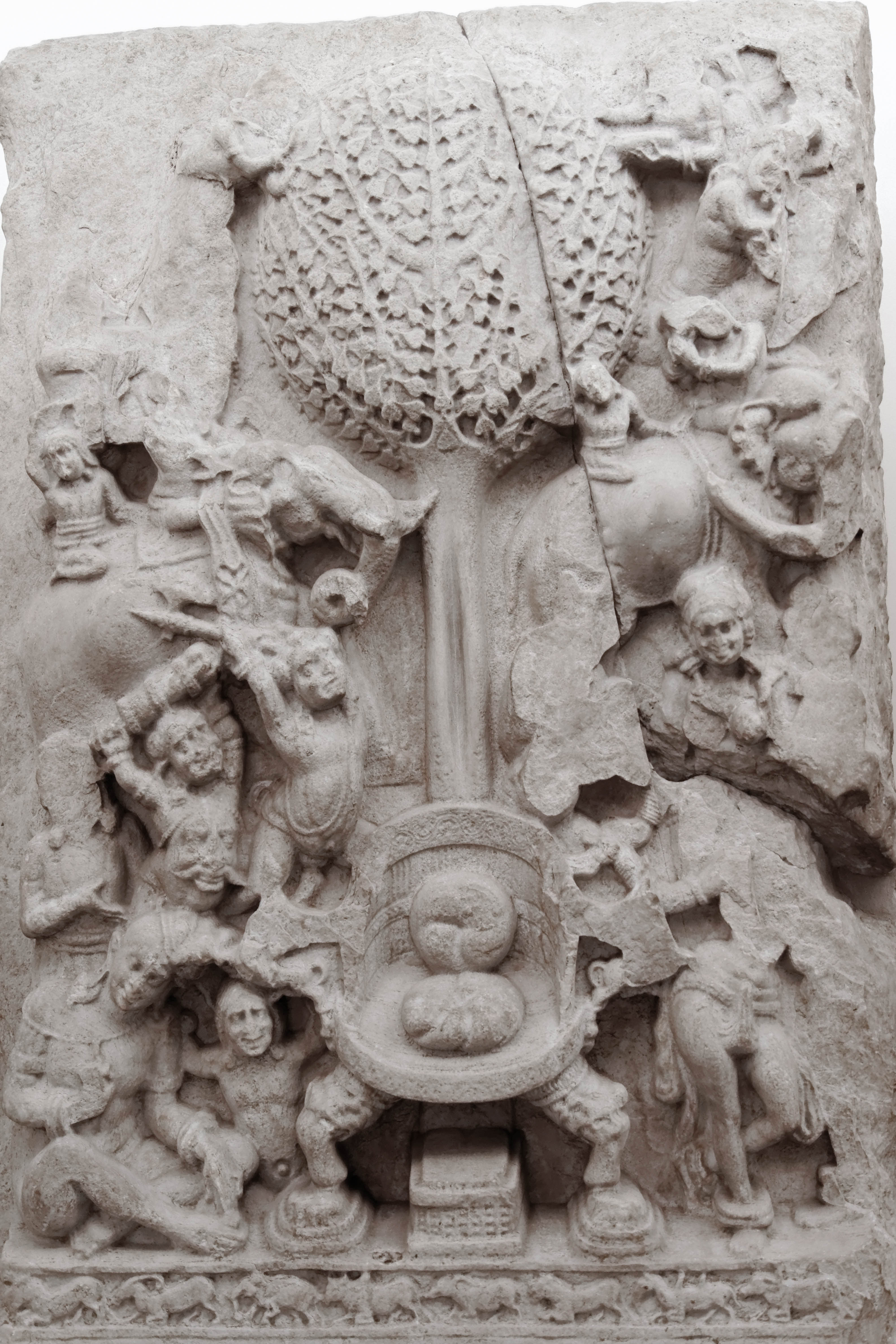 L'assaut de Mara - Andhra Pradesh - Ghantasala - IIe siècle - plaque de revêtement de stupa, calcaire marmoréen - Musée Guimet Représentation aniconique: Le Bouddha, étant arrivé au Parinirvana, n'a plus de corps et ne peut donc être représenté; sa présence est suggérée par un trône et l'arbre de la Bodhi.